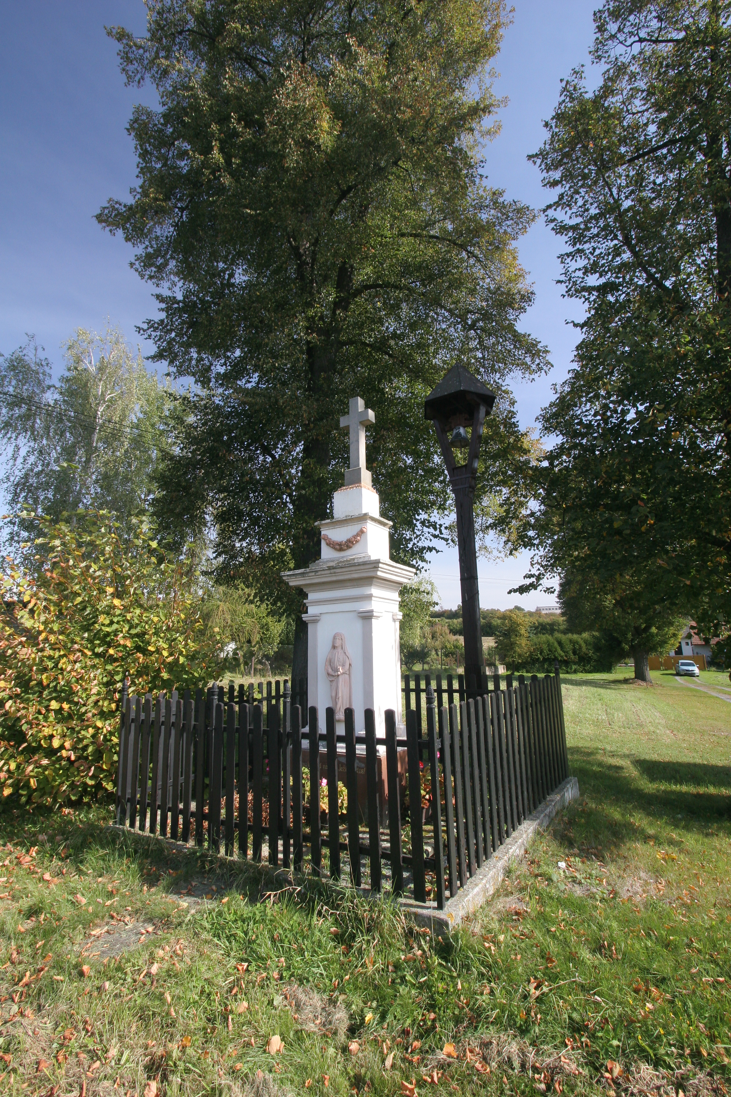 Benešovice křížek a zvonička